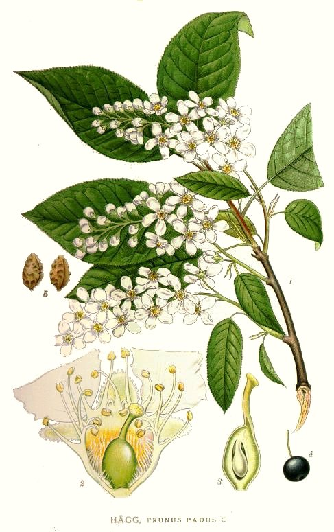 Prunus padus L. Original Description Hägg, Prunus padus L.